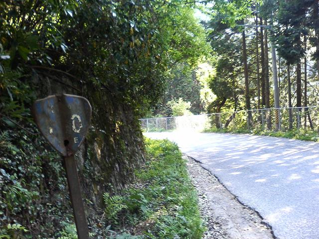 旧国道170号標識（旧国道371の紀見峠）